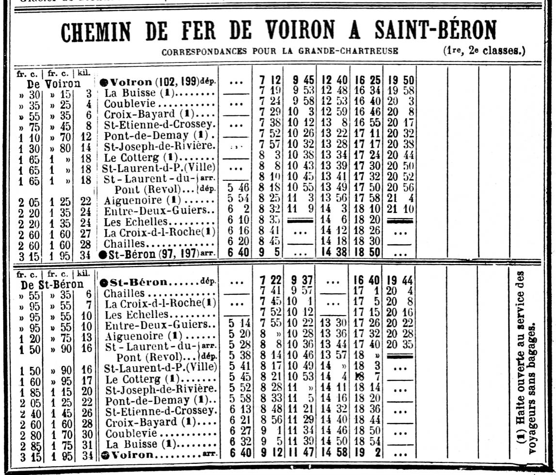 Livret Chaix Mai 1914 : Horaires de la ligne Voiron - Saint-Béron